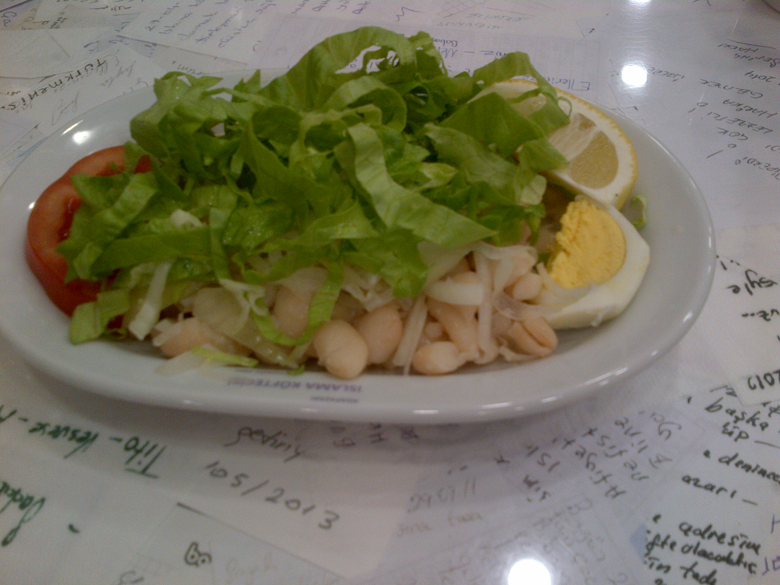 Piyaz es un plato frio (meze) de la cocina turca, hecho con judias (alubias) blancas, cebolla, huevo duro, y algo verde (lechuga o perejil).